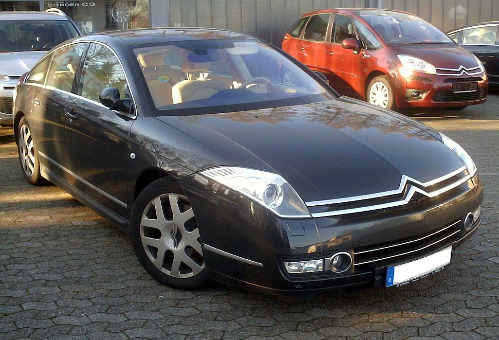 Citroen C6